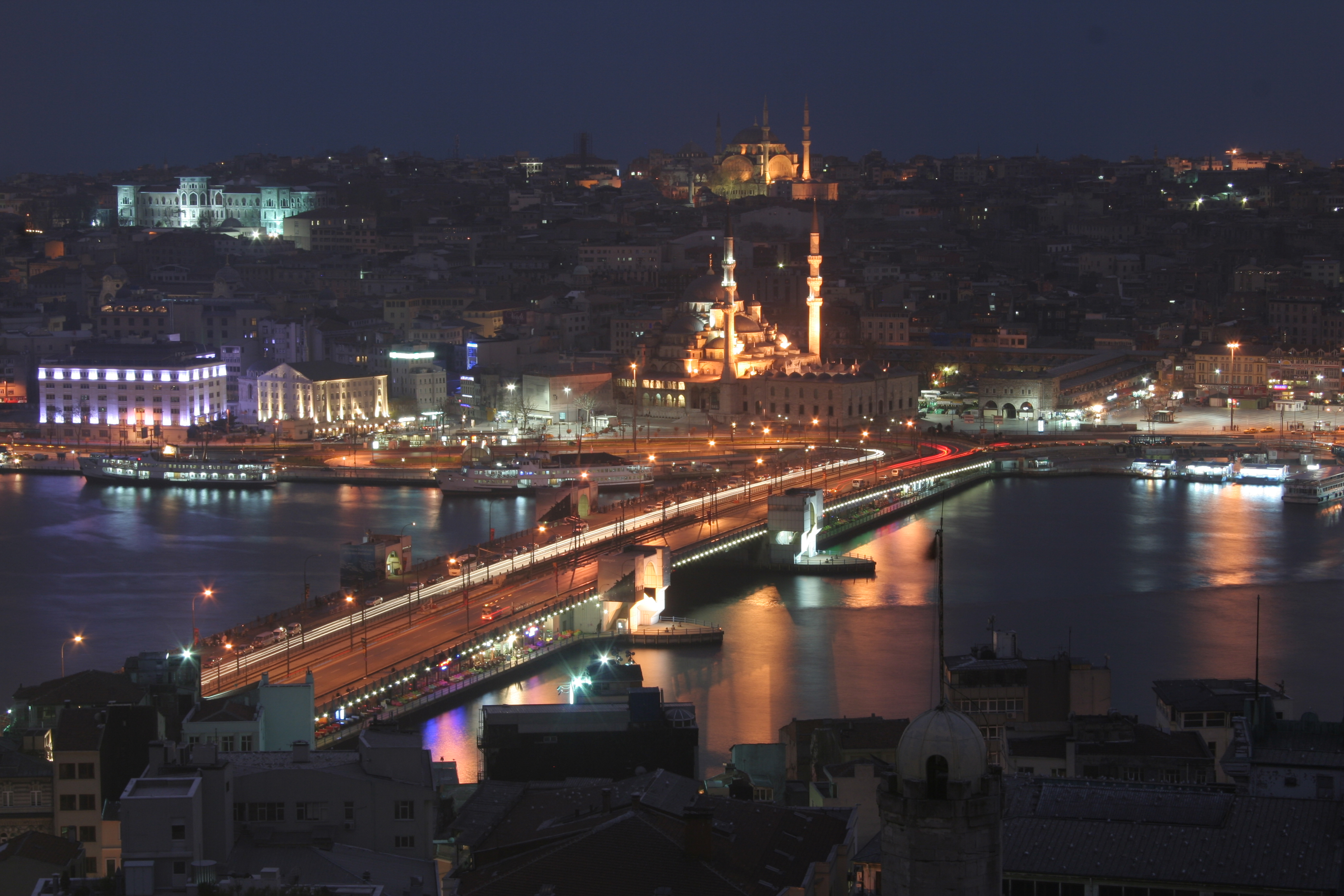 Golden Horn, Istanbul